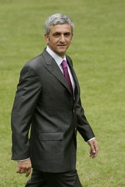 Hervé Morin, ministre de la Défense, président du Nouveau Centre